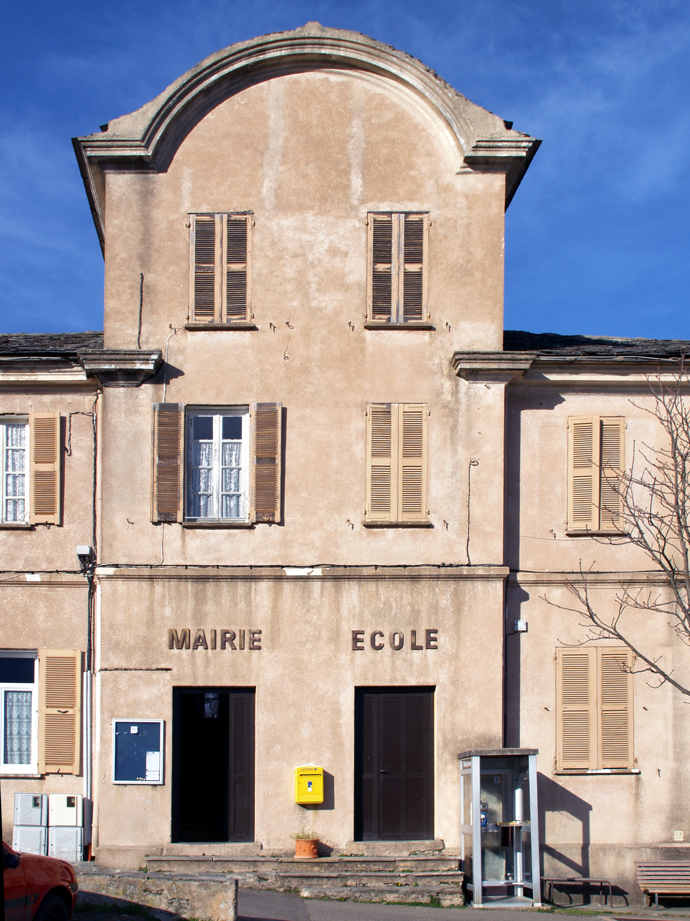 Croce, Castagniccia (Haute-Corse) - La mairie école